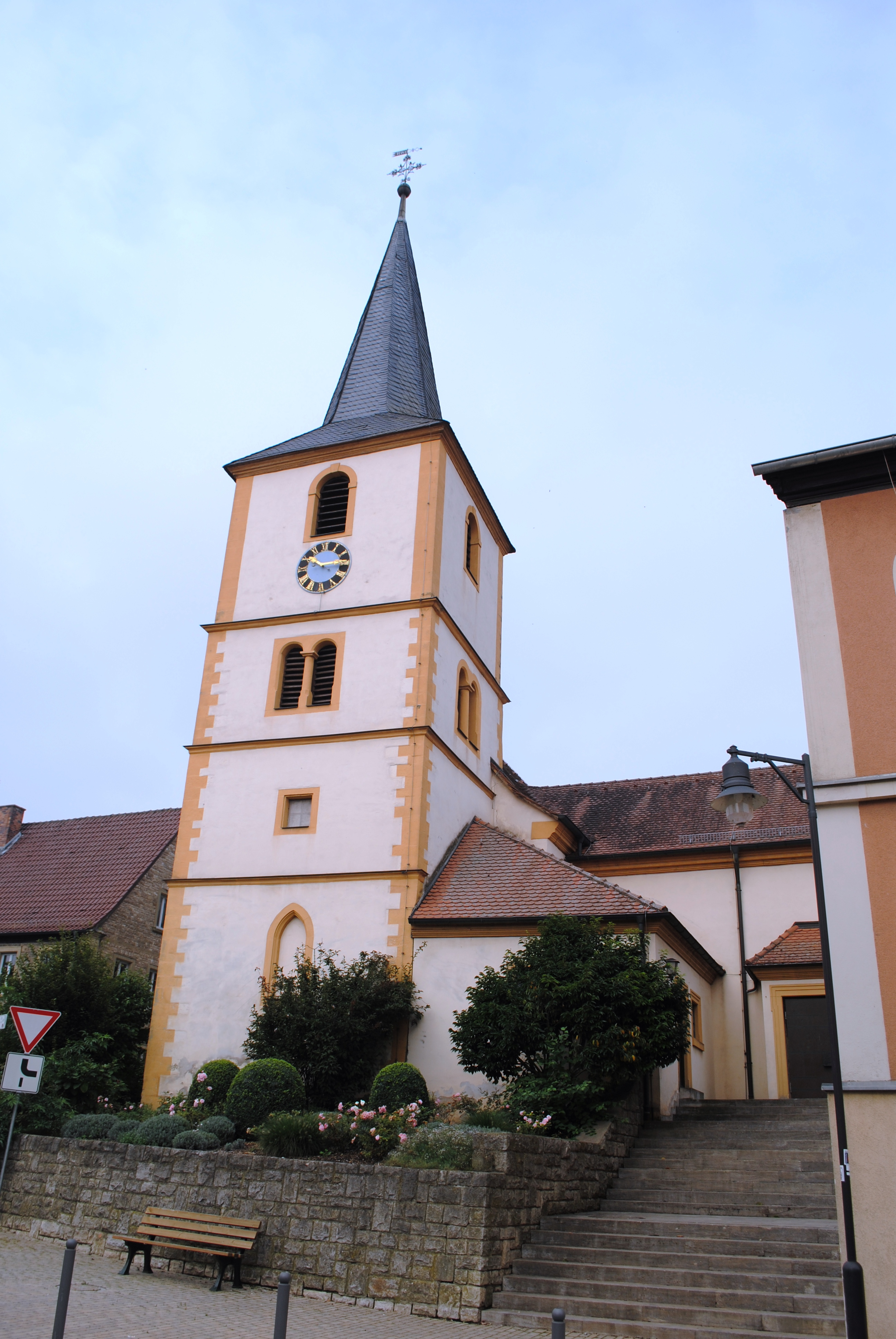 Pfarrkirche St. Simon und Judas, Bibergau